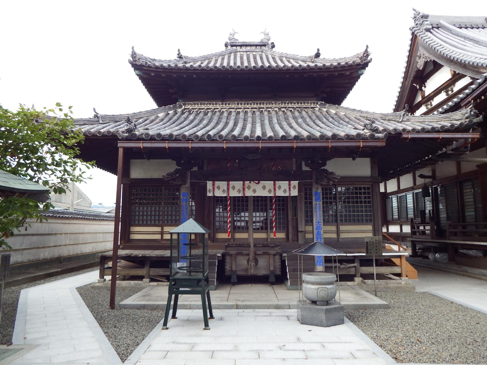 観音院の観音護摩堂